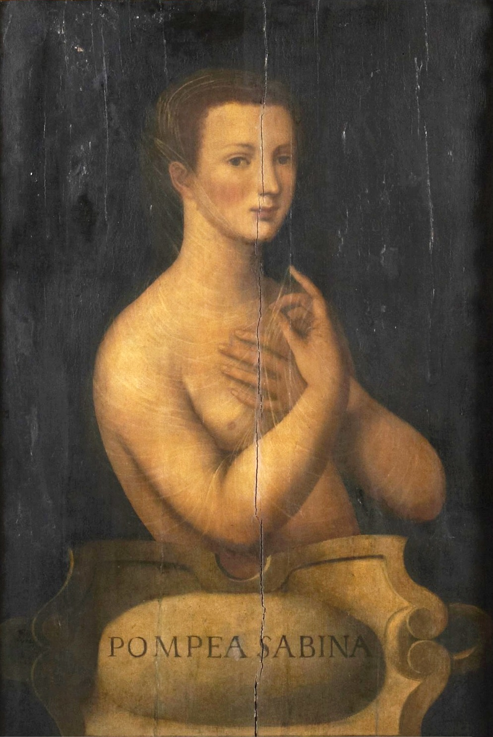 Schilderij Sabina-poppaea